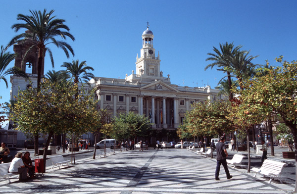 Rathaus von Cadiz